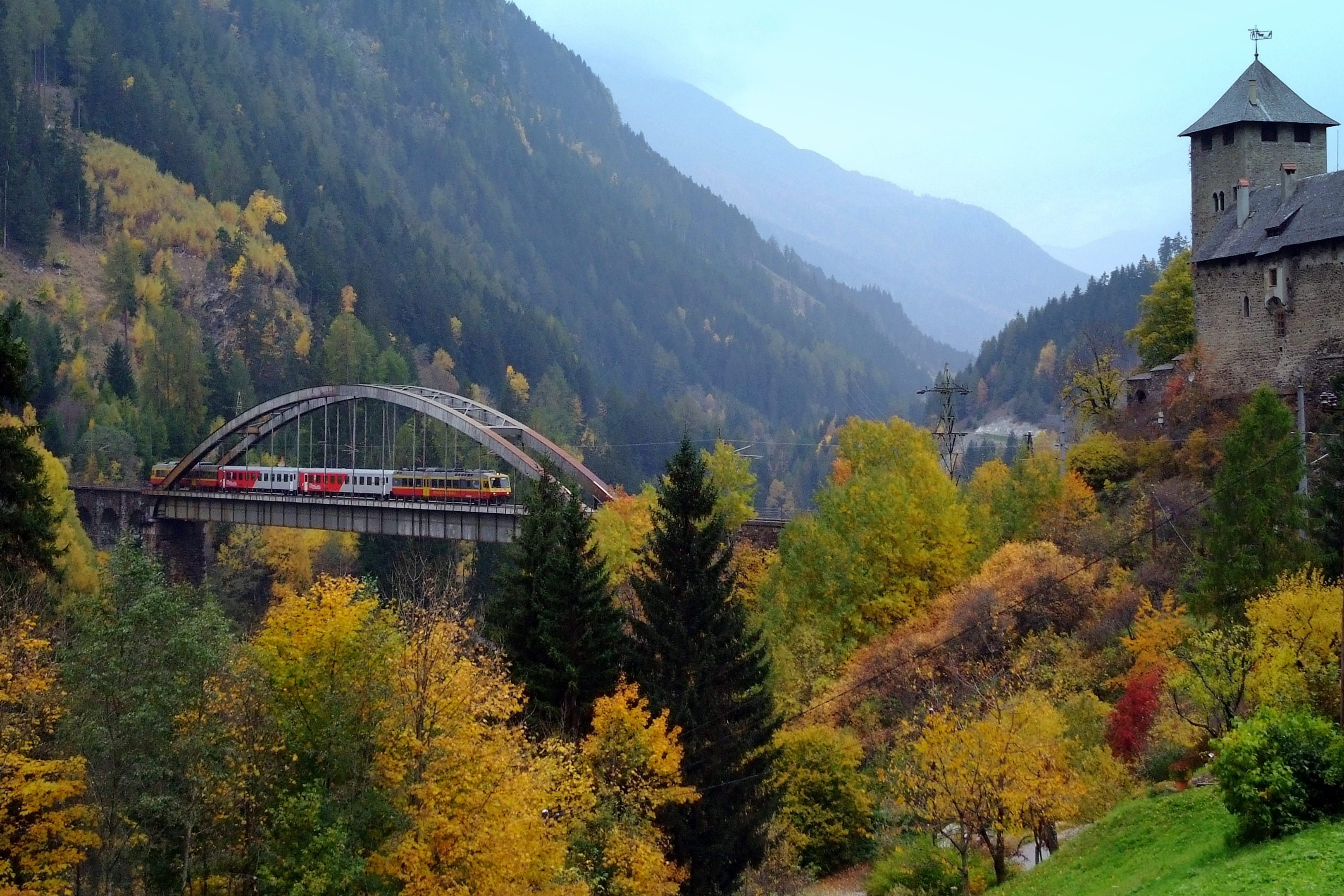 NPZ der Montafonerbahn auf der [Trisannabrücke], bei einer Sonderfahrt nach Innsbruck.